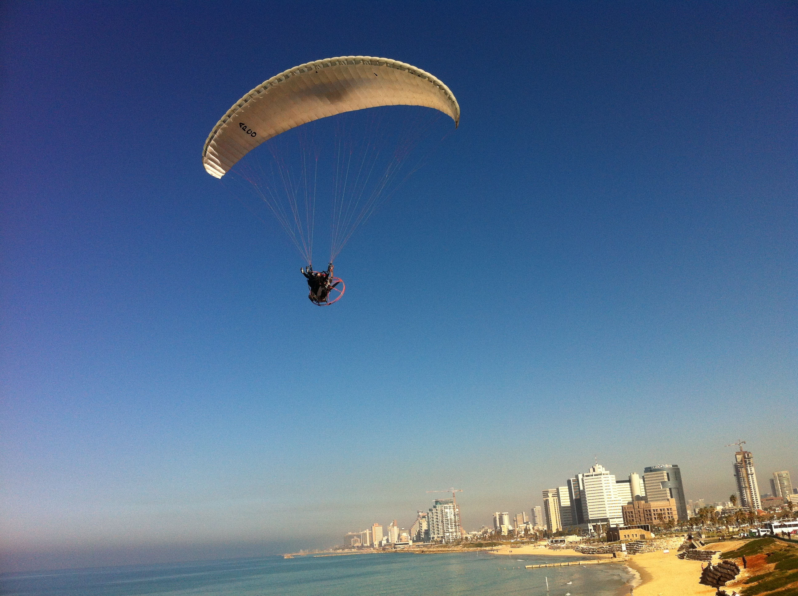 Flying over Tel Aviv, Israel